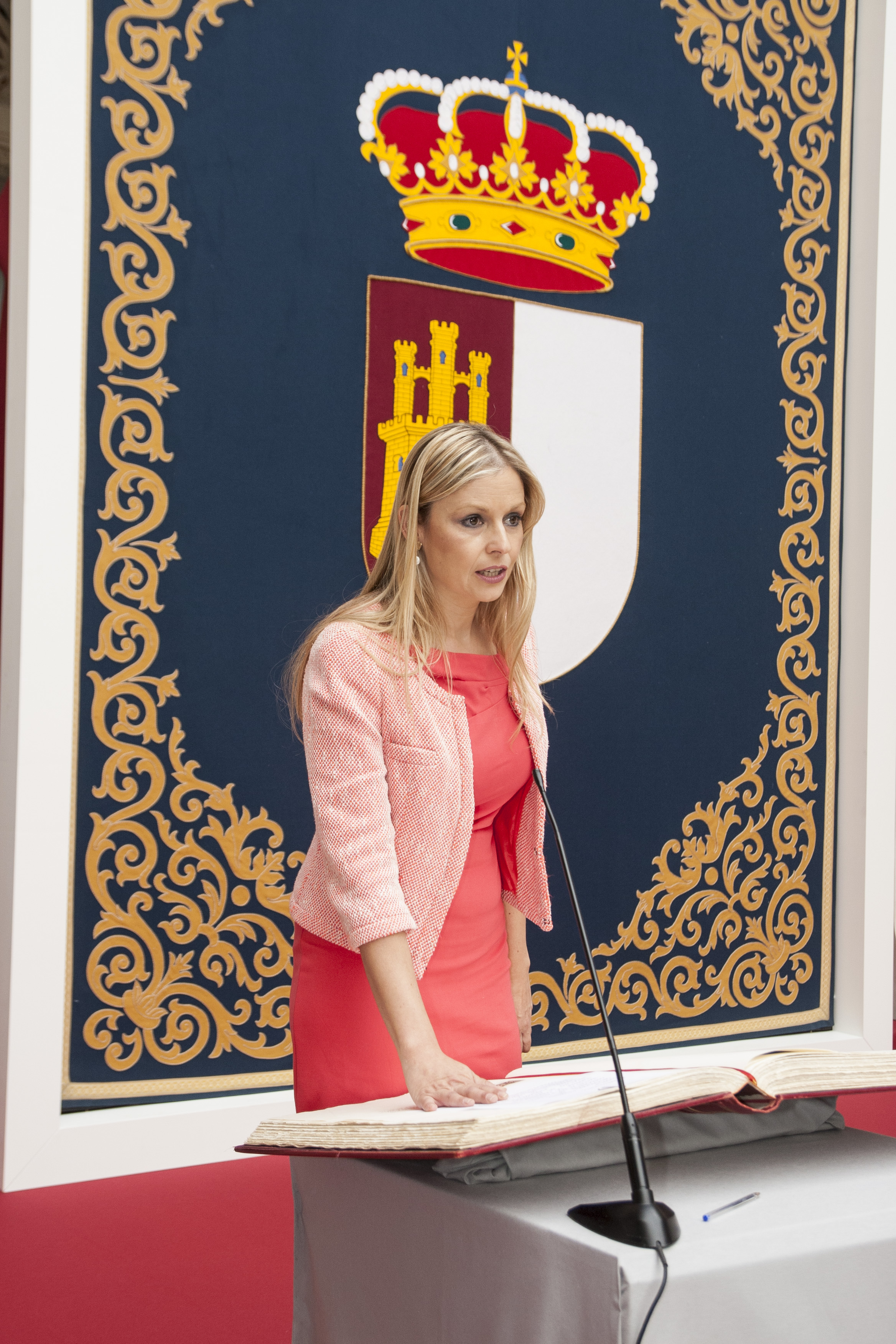 Acto de toma de posesión de los nuevos miembros del Consejo de Gobierno de Castilla-La Mancha.